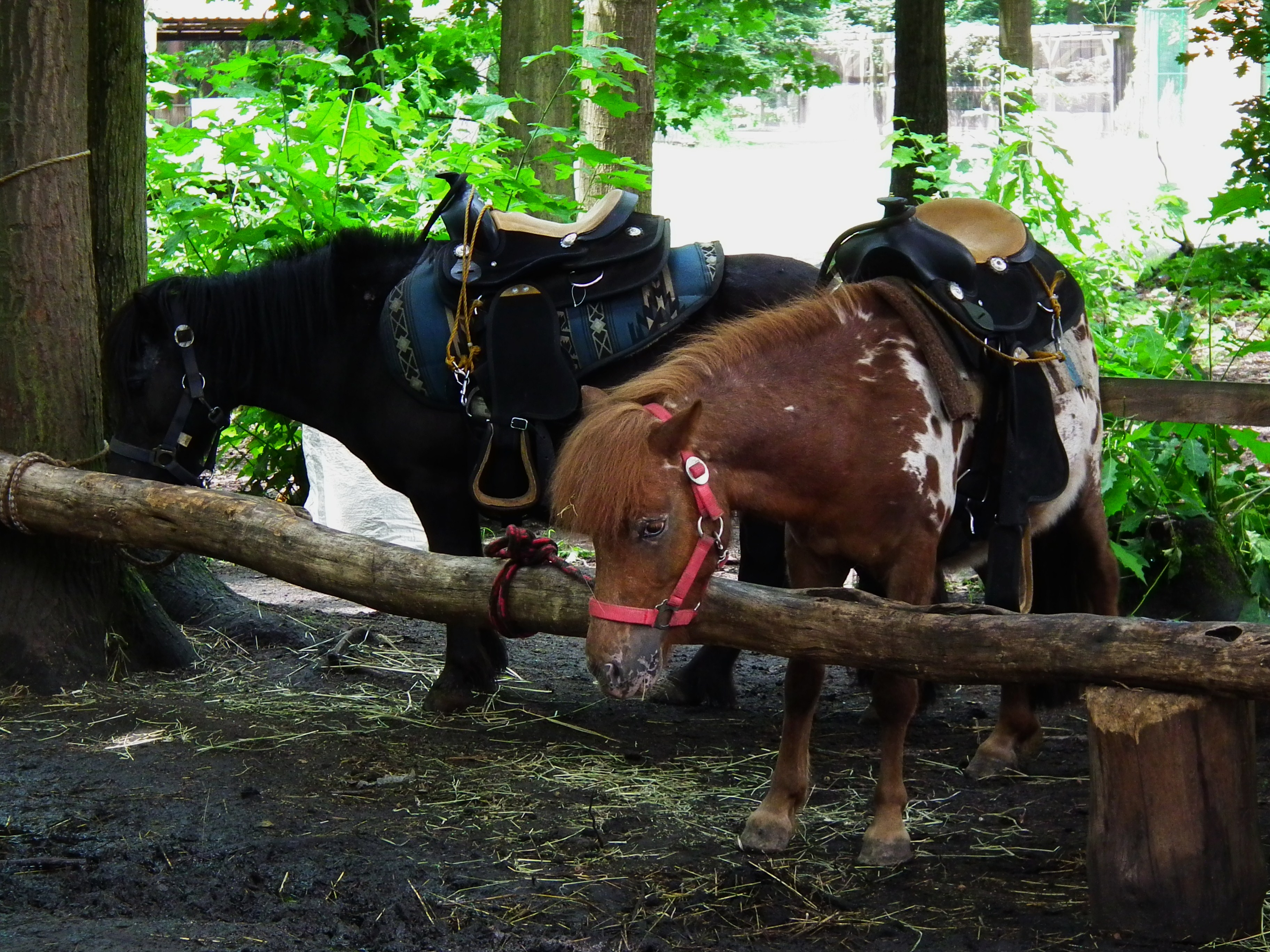 Ponies, aufgenommen im Wildpark Alte Fasanerie in Klein-Auheim (Hessen, Deutschland)